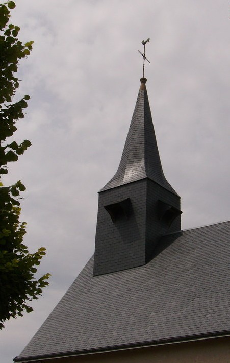 église de Saint Sulpice de Pommeray